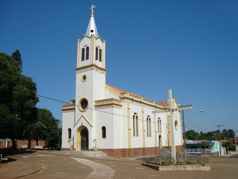 Igreja Matriz de Anhumas/SP